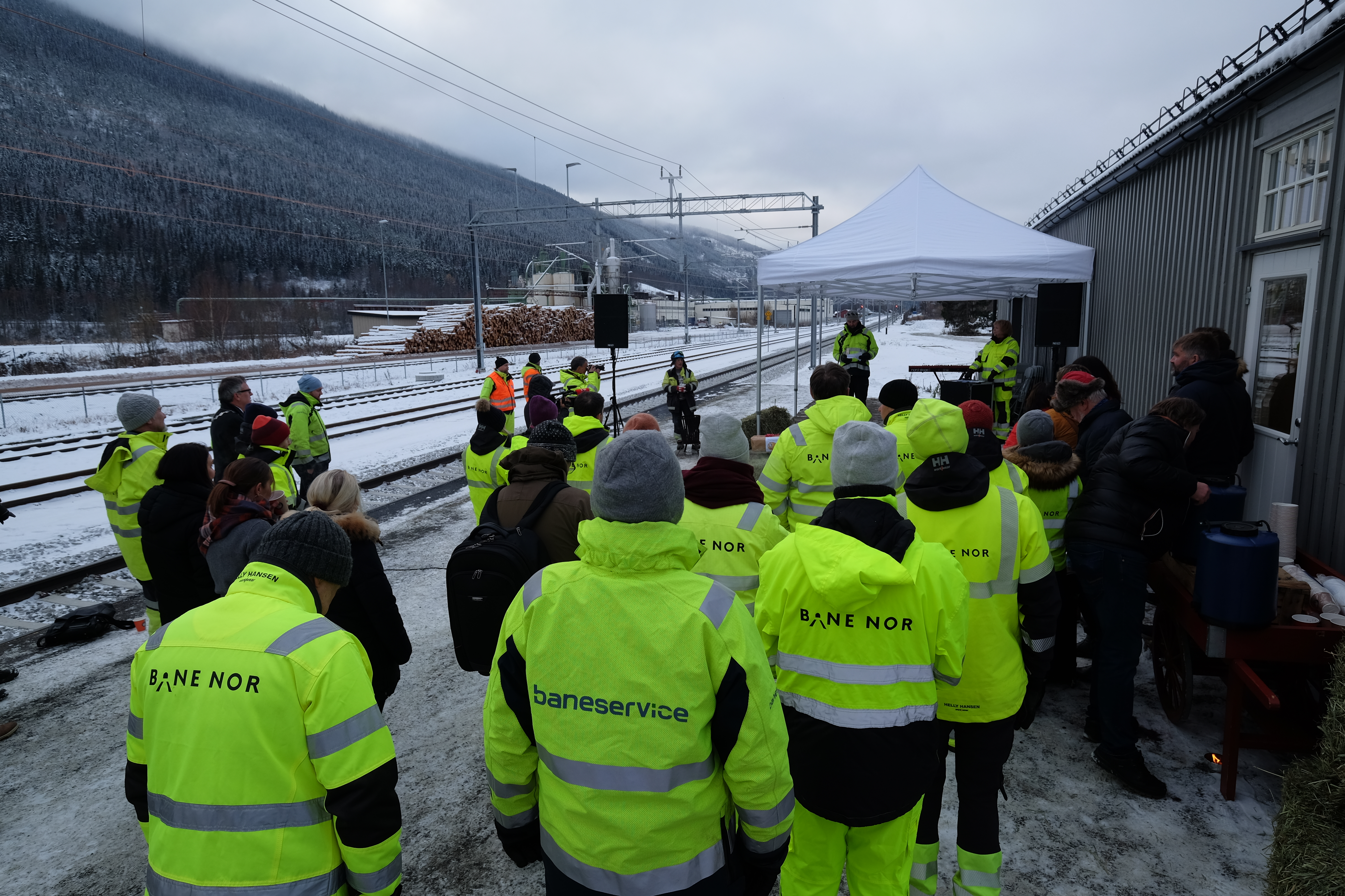 Fra Åpningen 2019